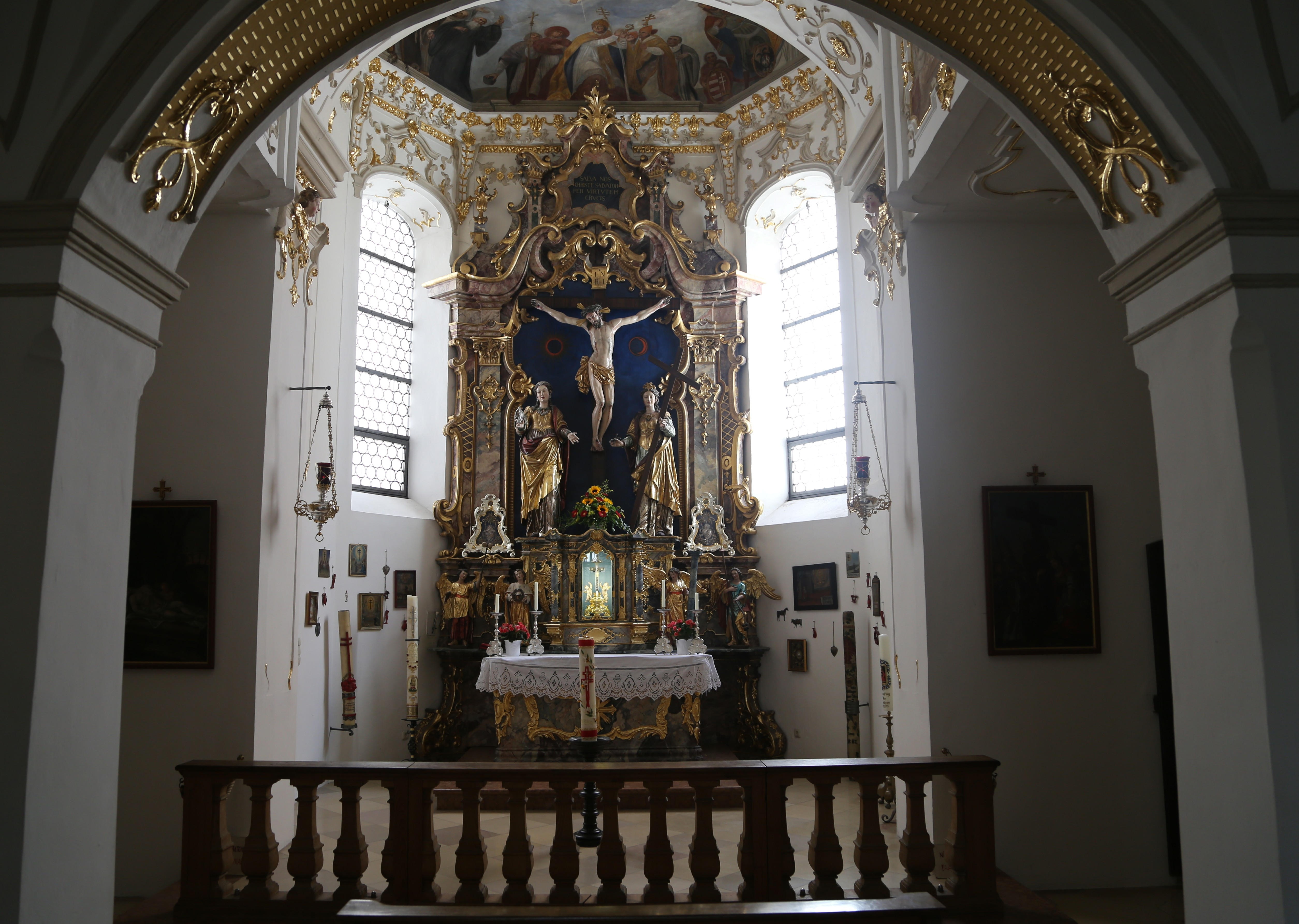 Kreuzkapelle Kloster Scheyern